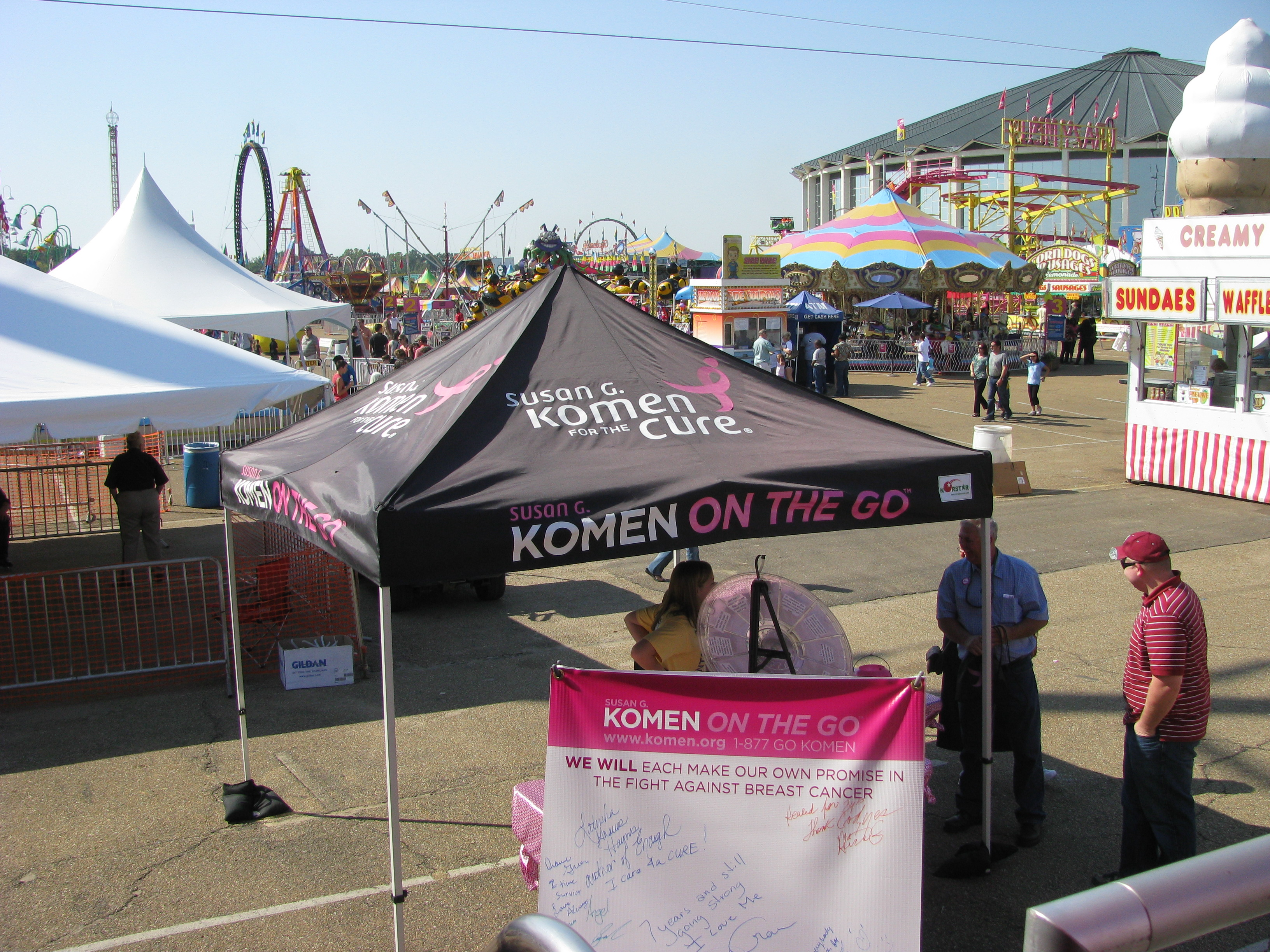 Mississippi State Fair, Jackson, Mississippi.